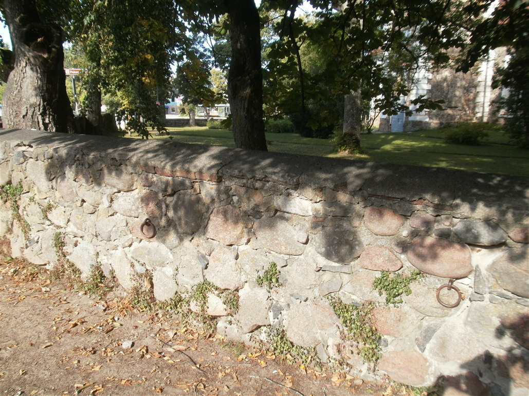 Kanepi kirikuaia maakividest piirdemüür augustis 2013. Näha on sepistatud rõngad hobuste sidumiseks.